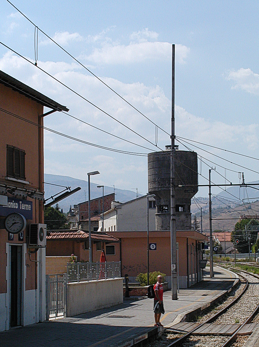 Statione di Scafa